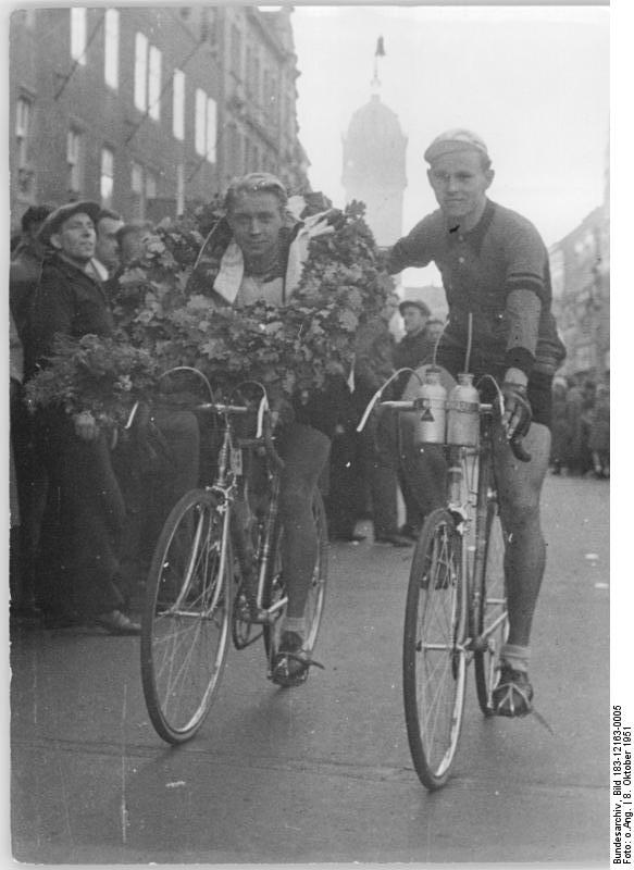 Friedensfahrt, Heinz Gleinig, Alfred Gothe Illus DS Wa-Qu. 8.10.51 Friedensfahrt der Nationen durch die DDR vom 3.-14.10.41 - 4. Etappe Stendal-Wittenberg UBz: Der Sieger der 4. Etappe, Heinz Gleinig (SV Einheit I) und der Zweite, Alfred Gothe (SV Lokomotive). Leihweise Illus Berlin Ws